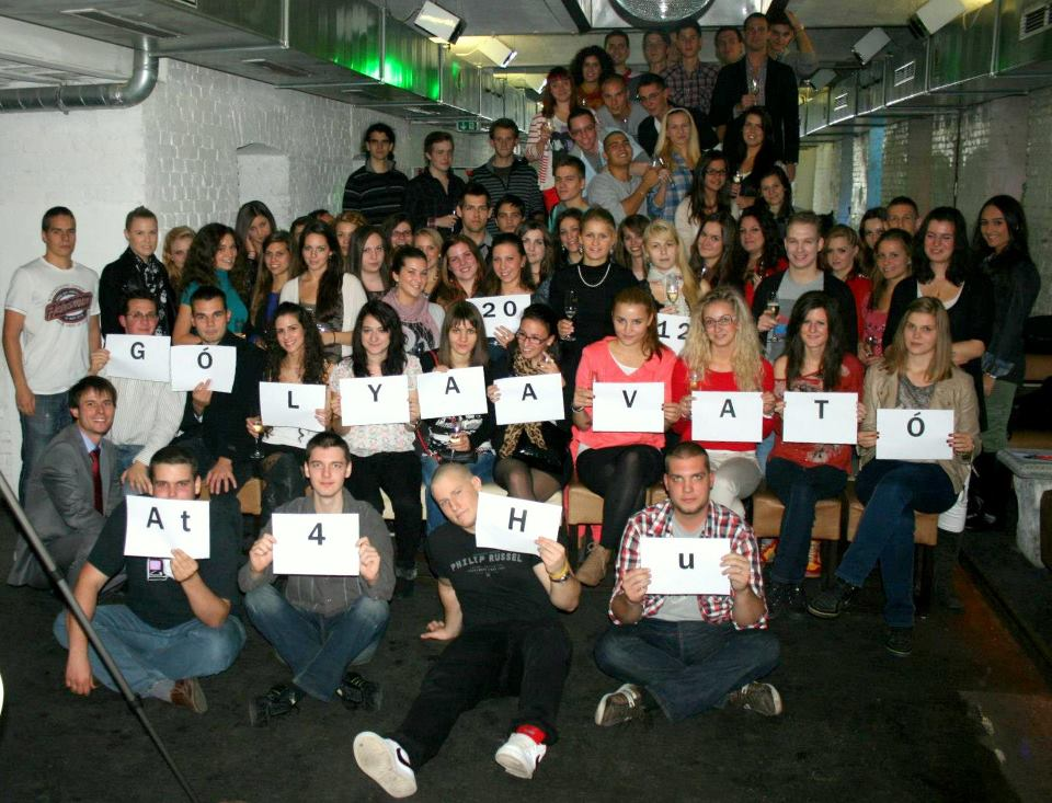 At4Hu Gólyaavató 2012